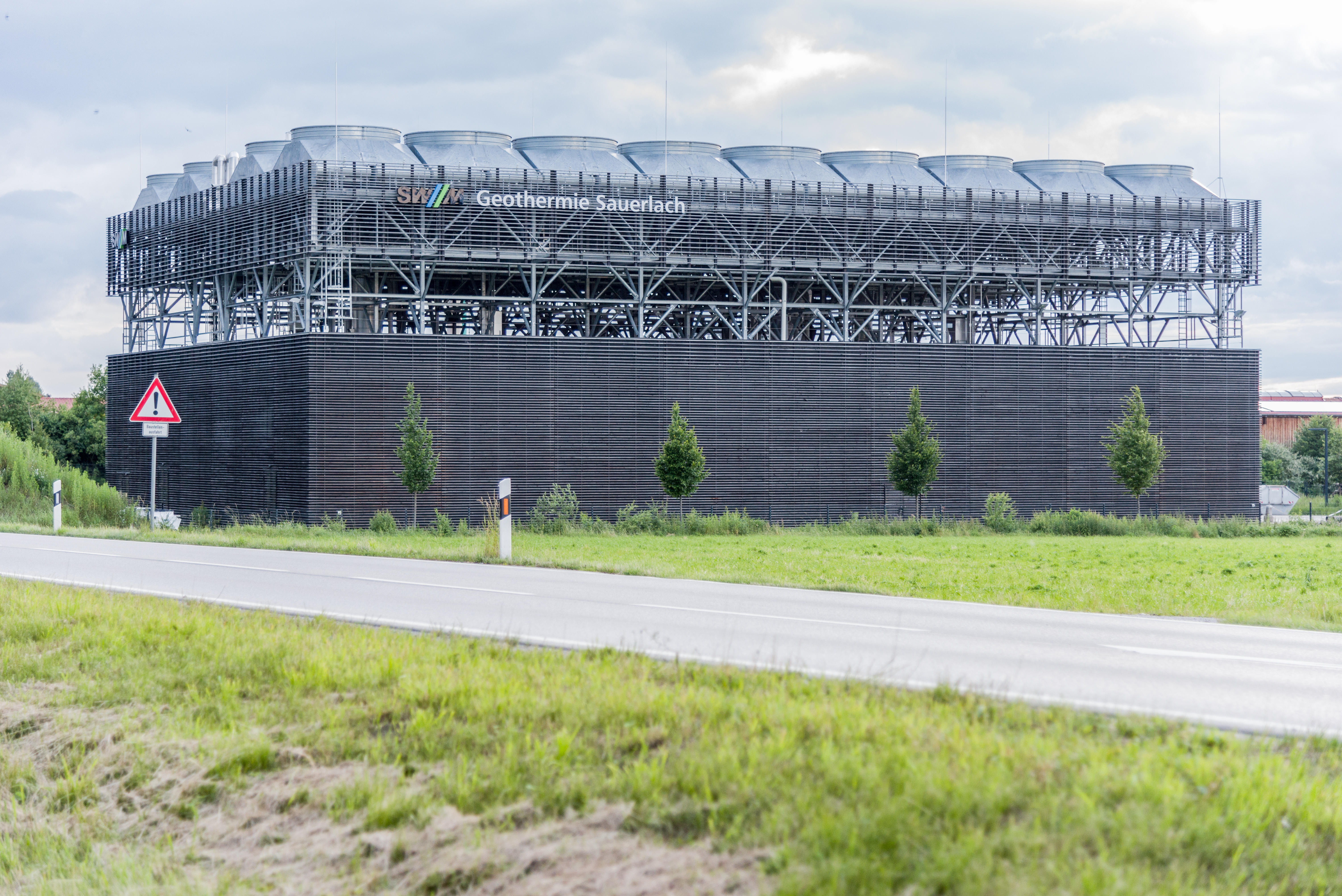 Geothermiekraftwerk Sauerlach, betrieben von den Stadtwerken München (SWM).